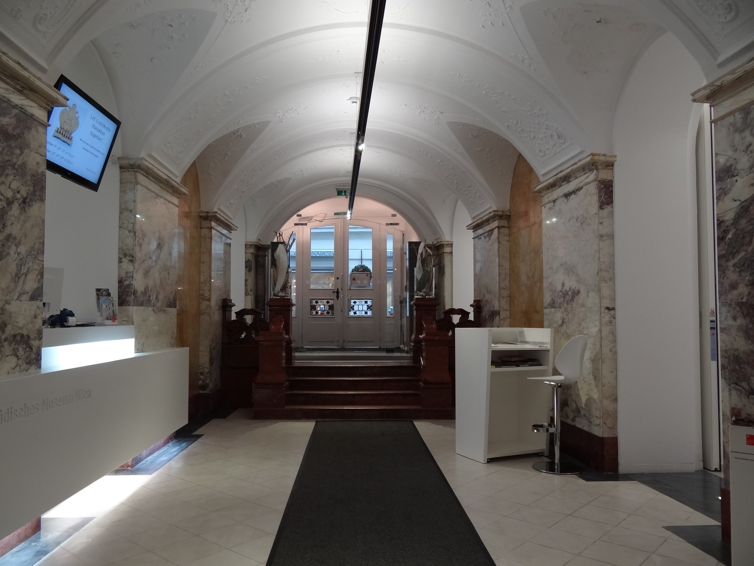 Jüdisches Museum Wien Verstibül